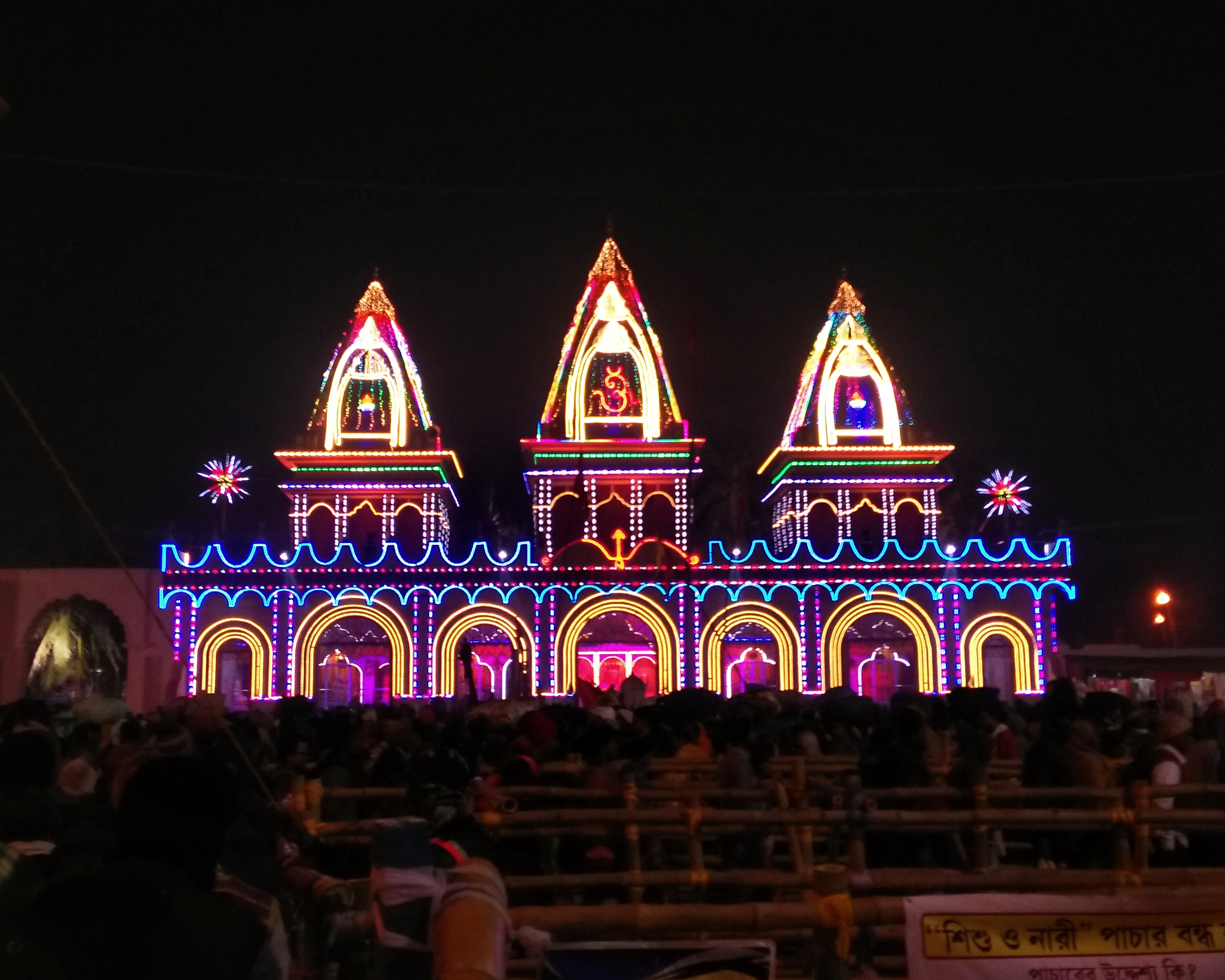 কপিল মুনি আশ্রম, গঙ্গাসাগর